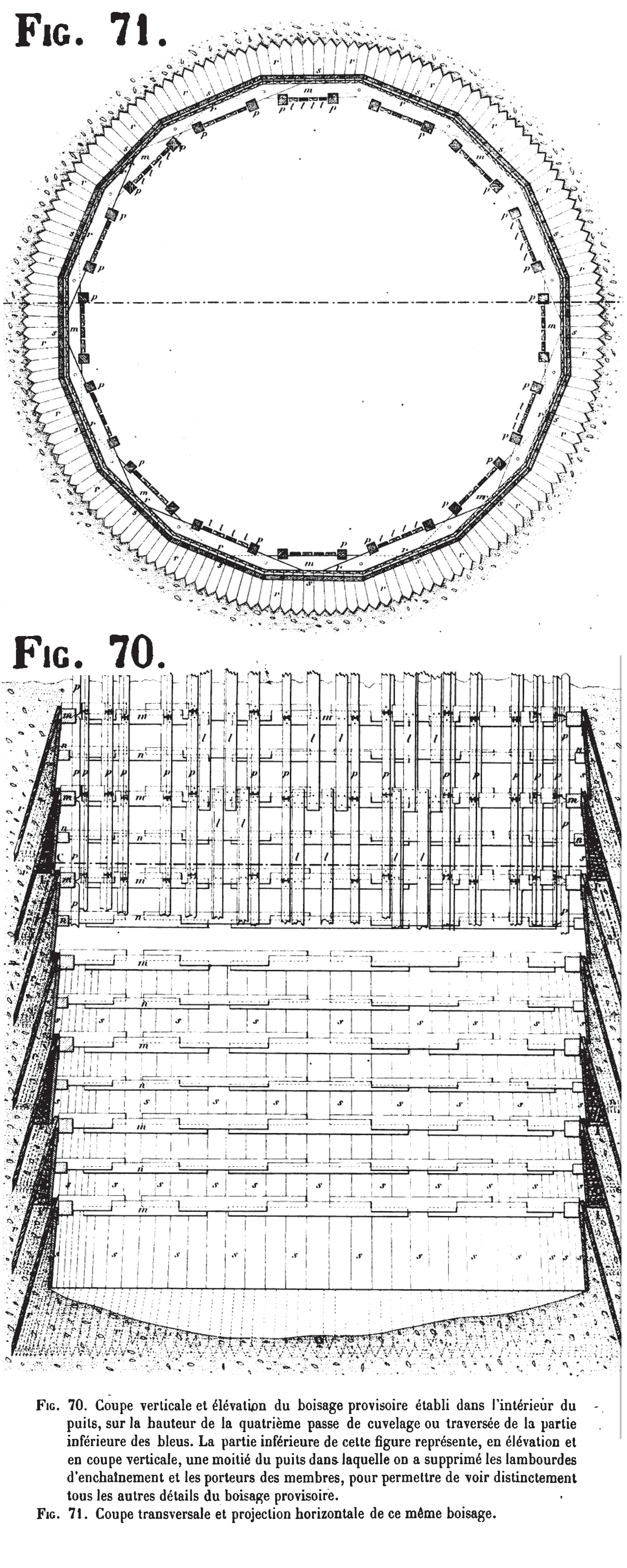 Image extraite de l'ouvrage De l'établissement des puits de mines dans les terrains ébouleux et aquifères, construction et éboulement des fosses de Marles afin d'illustrer un cuvelage typique des mines du Nord-Pas-de-Calais au XIXème siècle. L'image représente deux vues d'un cuvelage dans un puits en cours de fonçage dans la décennie de 1850. Ce genre de cuvelage pouvait parfaitement s'appliquer à des fosses comme les trois avaleresses creusées, sans succès, par la Compagnie d'Hasnon en 1839 et 1840.